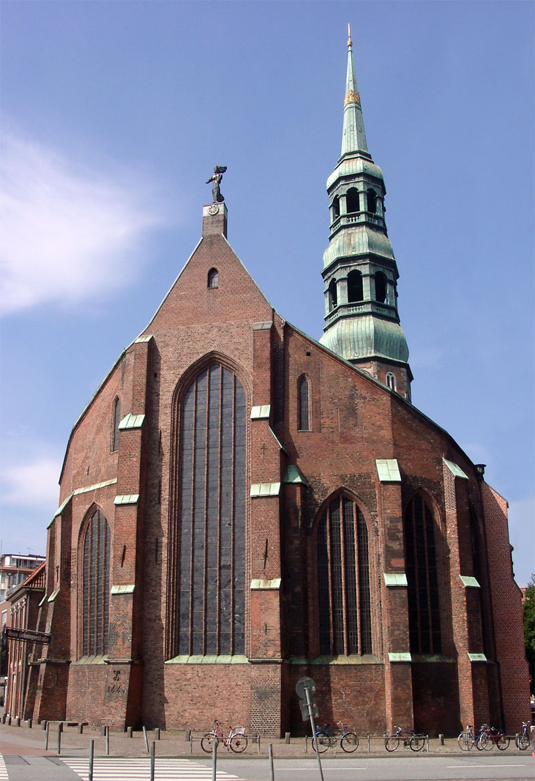 Katharinenkirche in Hamburg-Altstadt This is a photograph of an architectural monument.